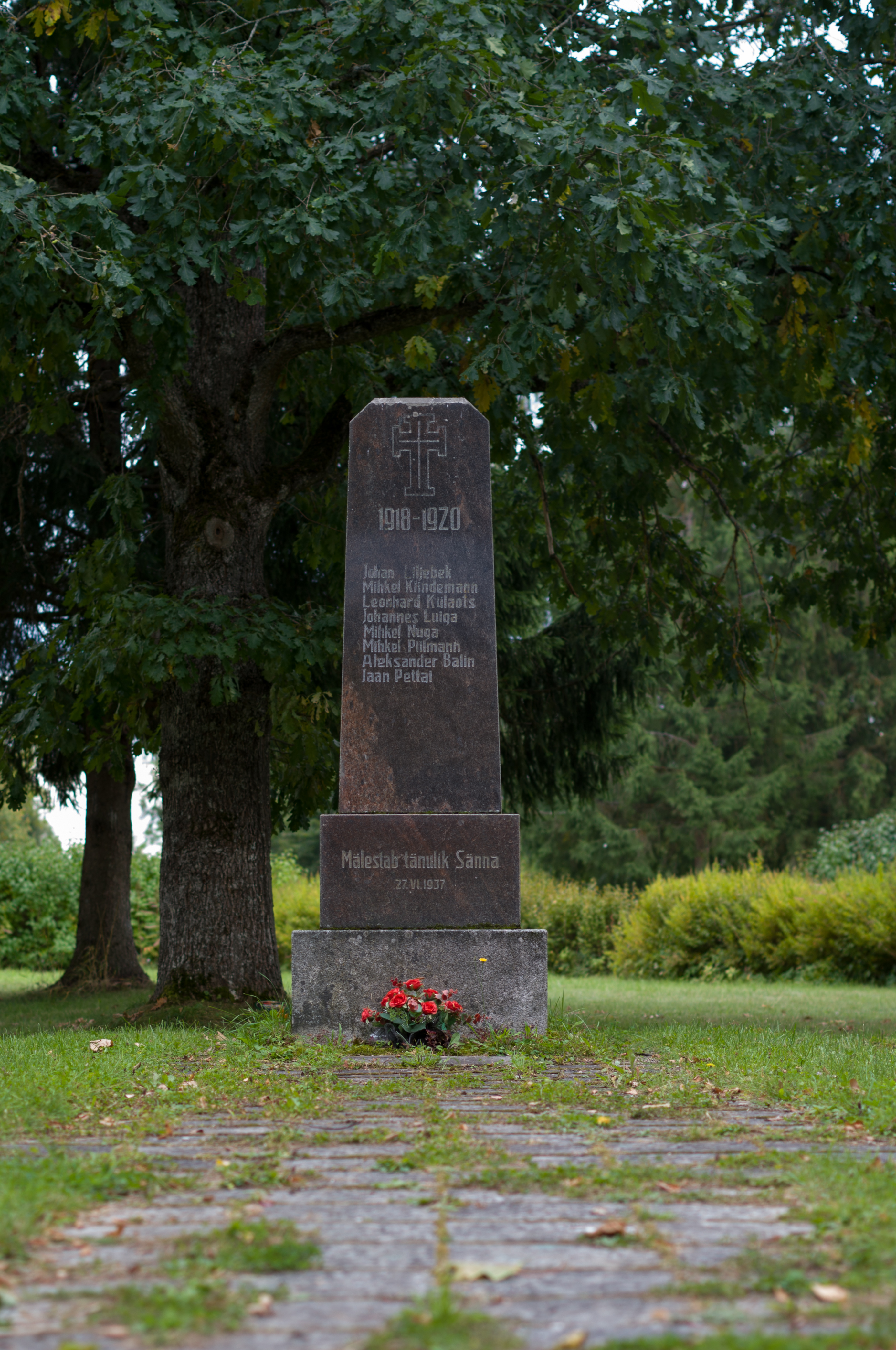 Sänna vabadussõja mälestussammas